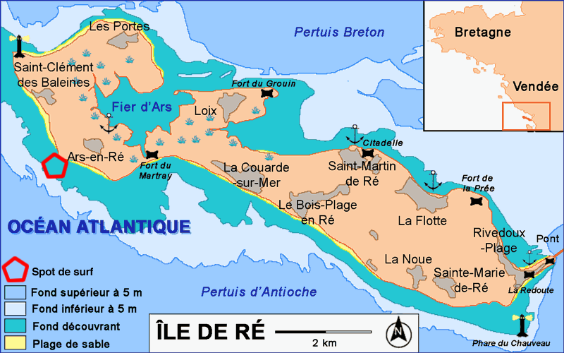 Carte de l'île de Ré - Spot de surf de Grignon. Dessin original de utilisateur:Pline Pep.per 4 octobre 2006 à 11:00 (CEST)